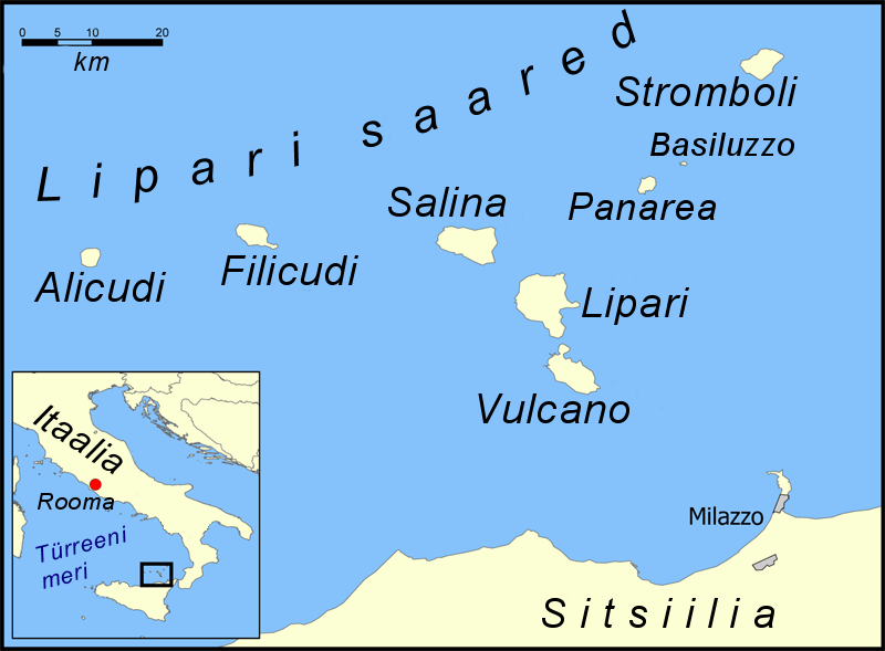 Lipari saarte kaart